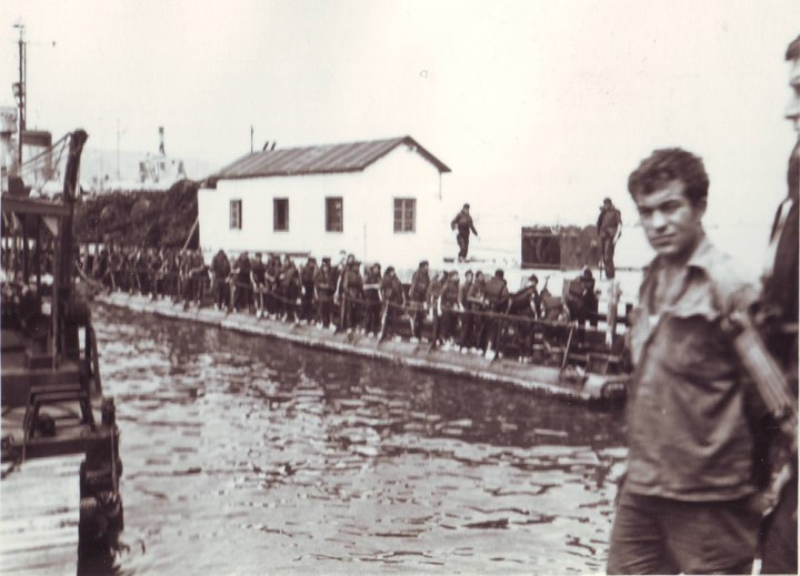 בסיס הקבע של יחידה 707 על שובר הגלים בנמל חיפה